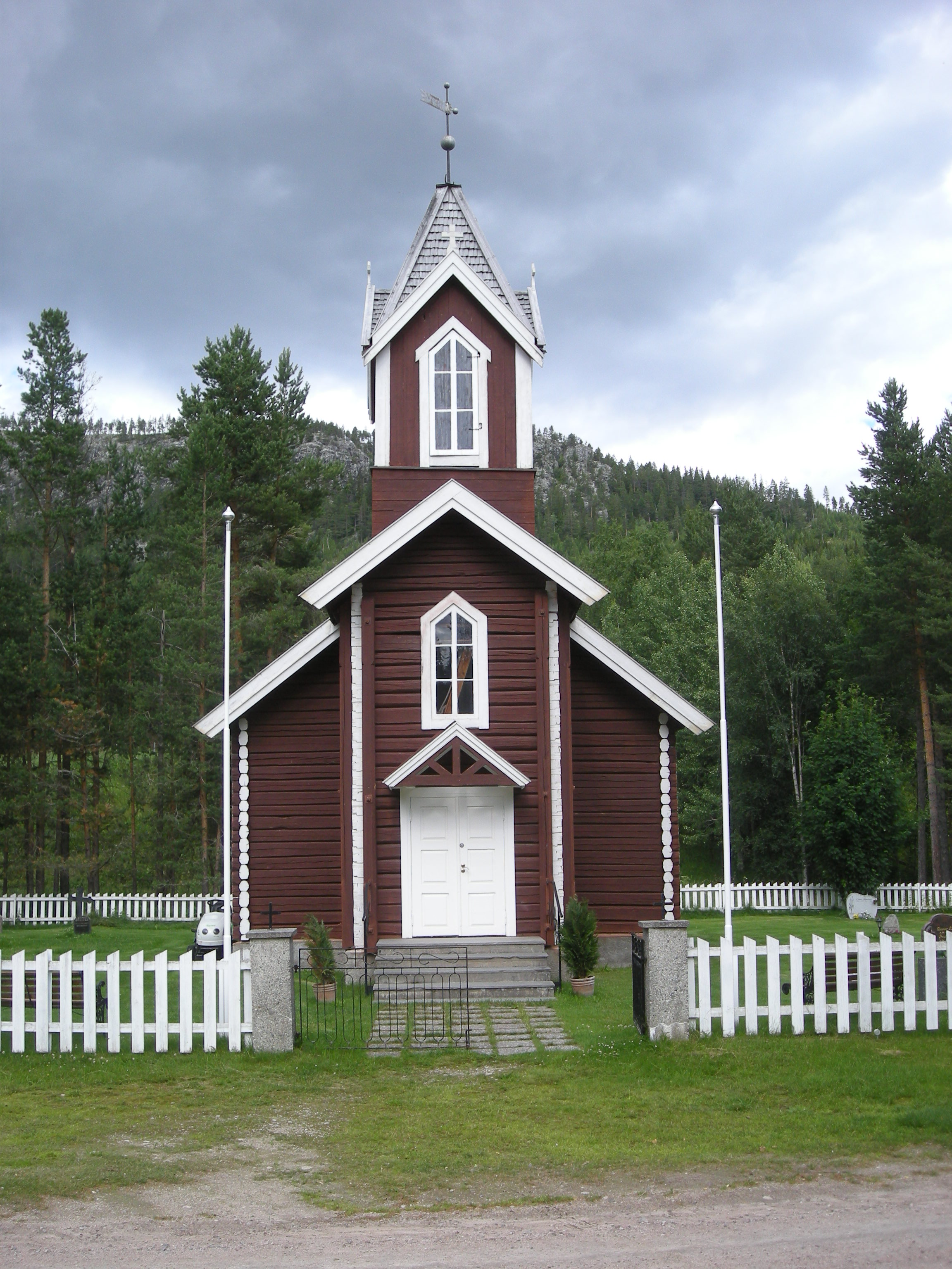 Søre Elvdal kirke med fylkesvei 581 foran